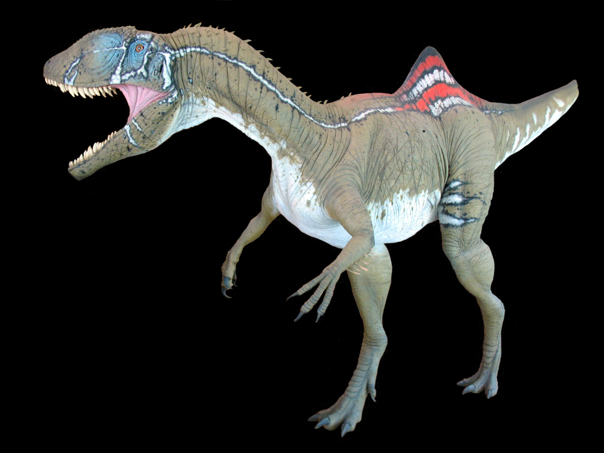 Figura de Concavenator corcovatus de Las Hoyas - Museo Paleontológico de Castilla-La Mancha (Cuenca, España)